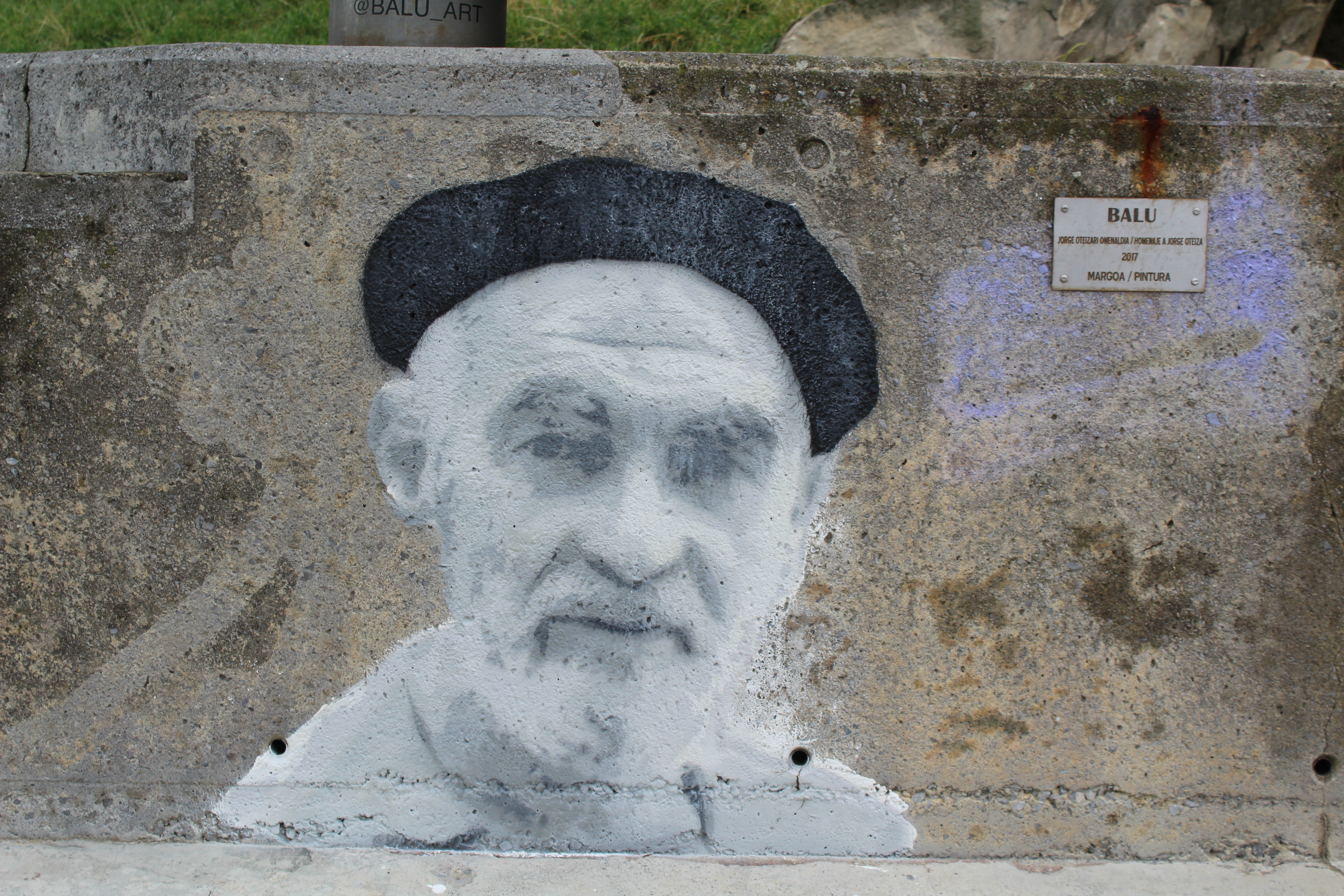 Jorge Oteizari omenaldi grafitia Donostiako Paseo Berrian